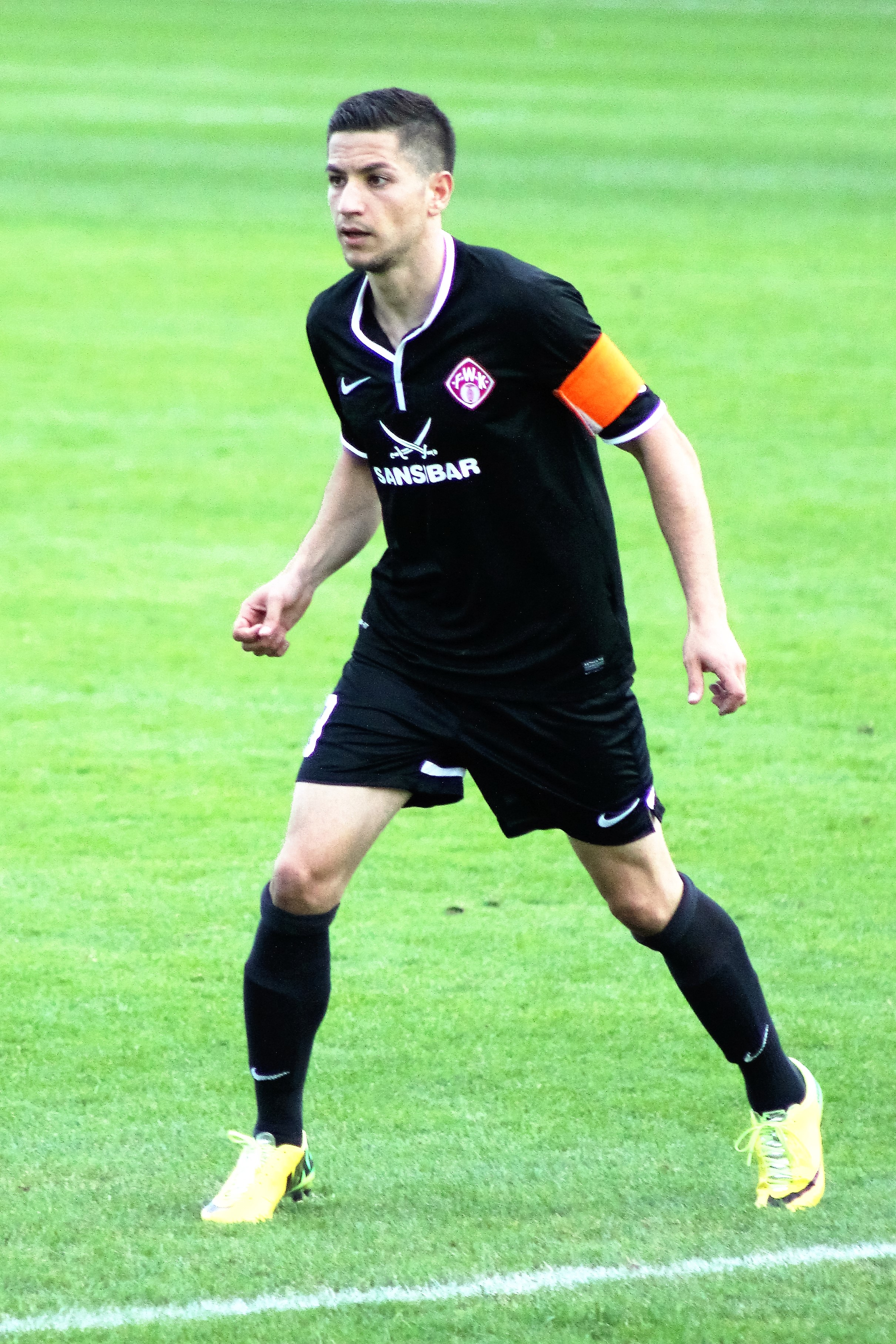 Shapourzadeh, Amir Würzburg